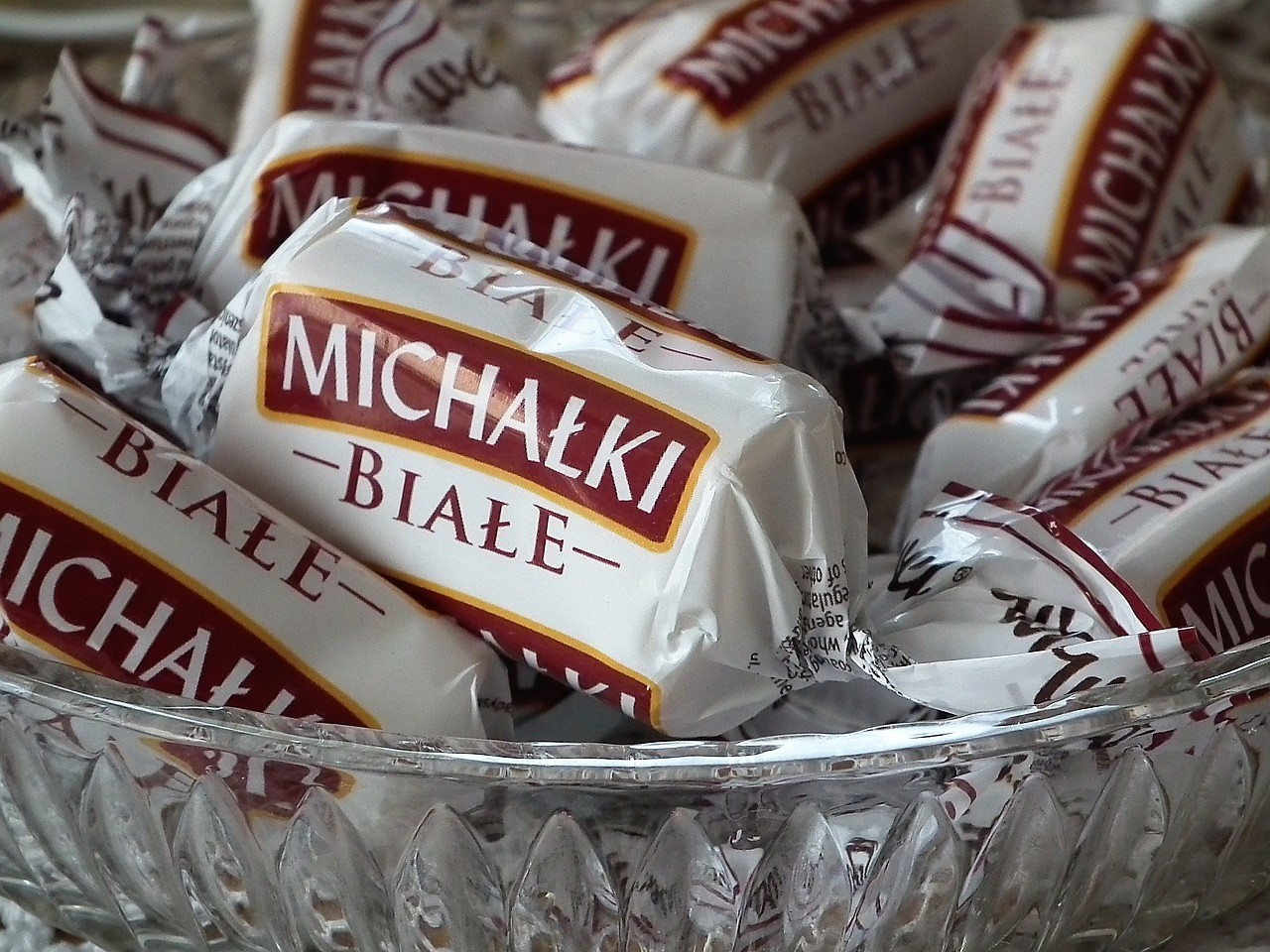 Michałki białe, kilkanaście cukierków w wersji produkowanej przez firmę Wawel